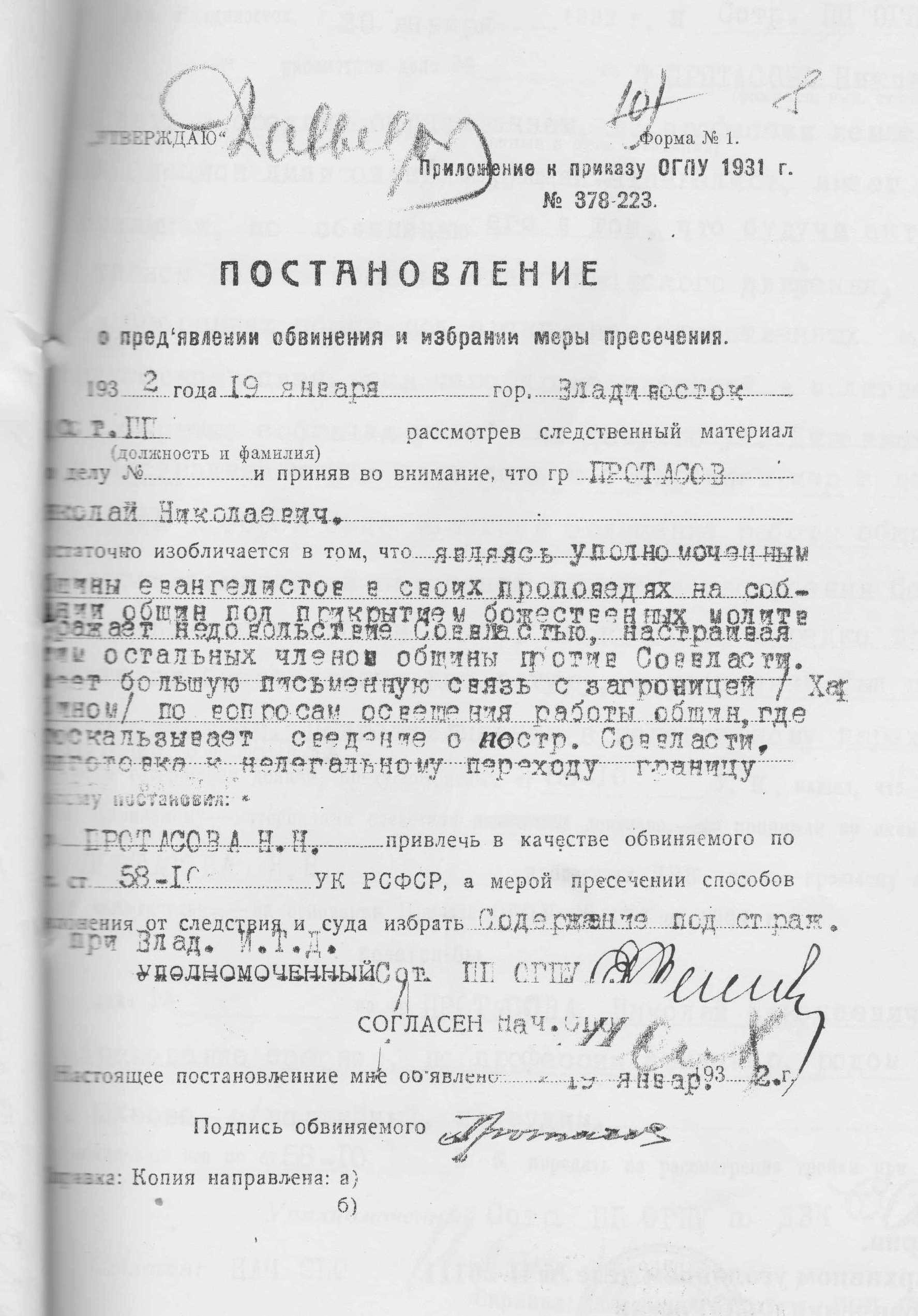 Постановление о предъявлении обвинения и избрании меры пресечения проповеднику евангельских христиан Николаю Николаевичу Протасову